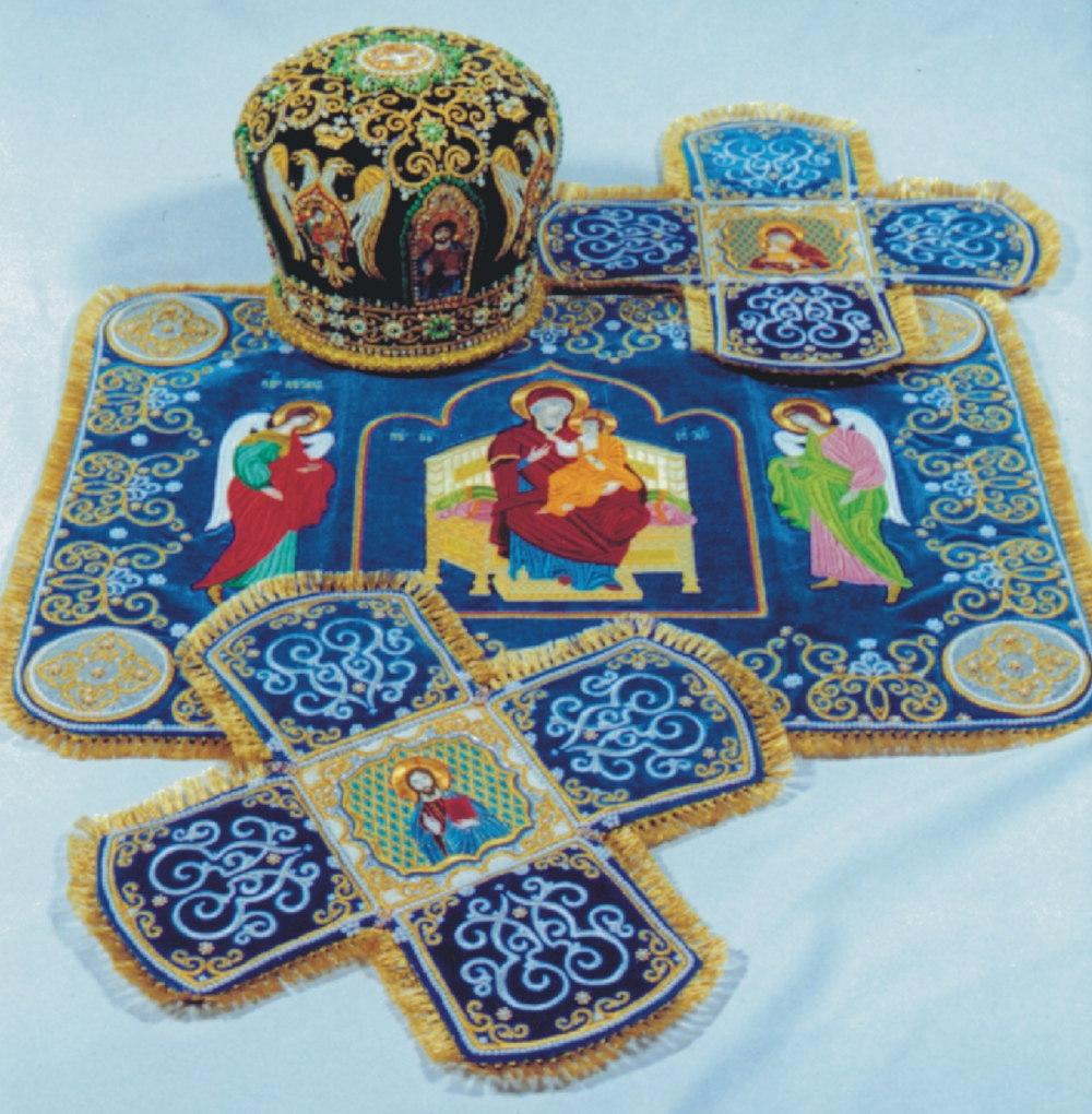 Oleg Blazhko's gold embroidery